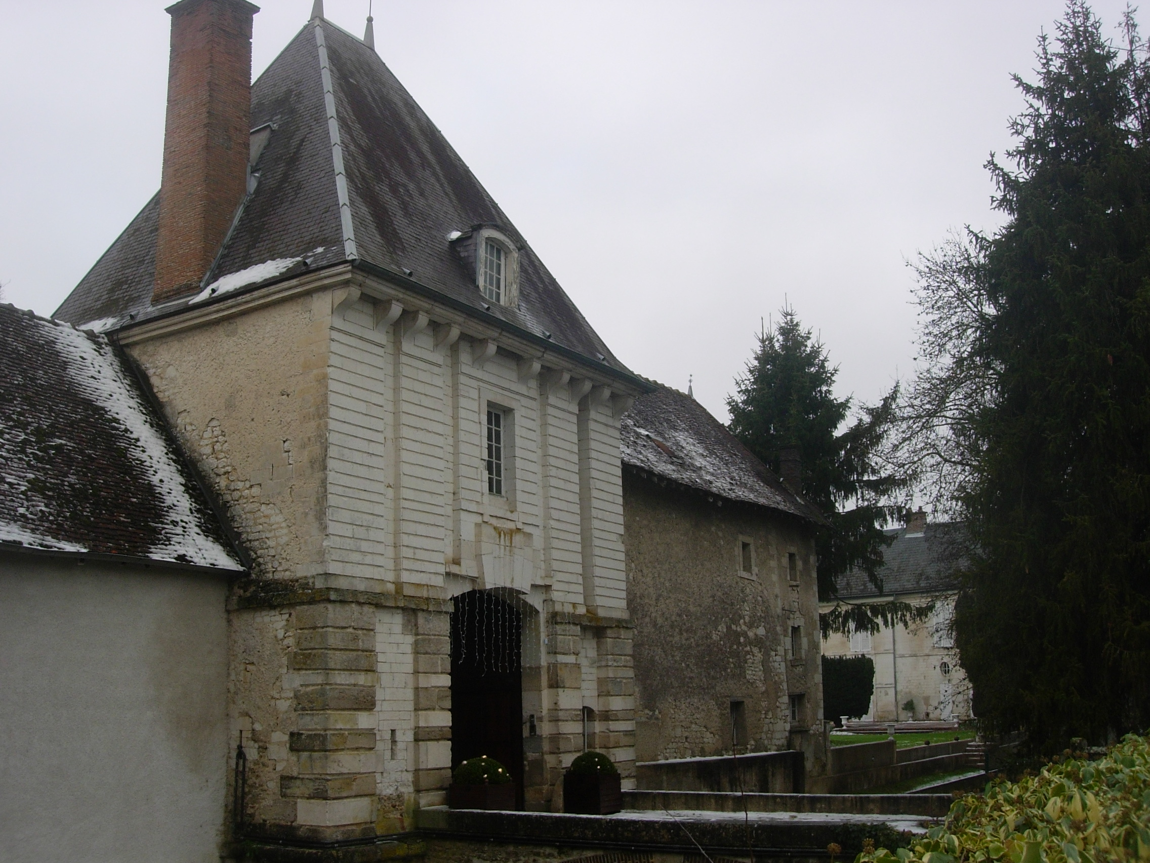 Château de Rosières-près-Troyes construit par Perrault